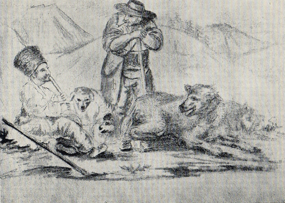 Ciobani